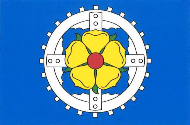 Řídelov vlajka